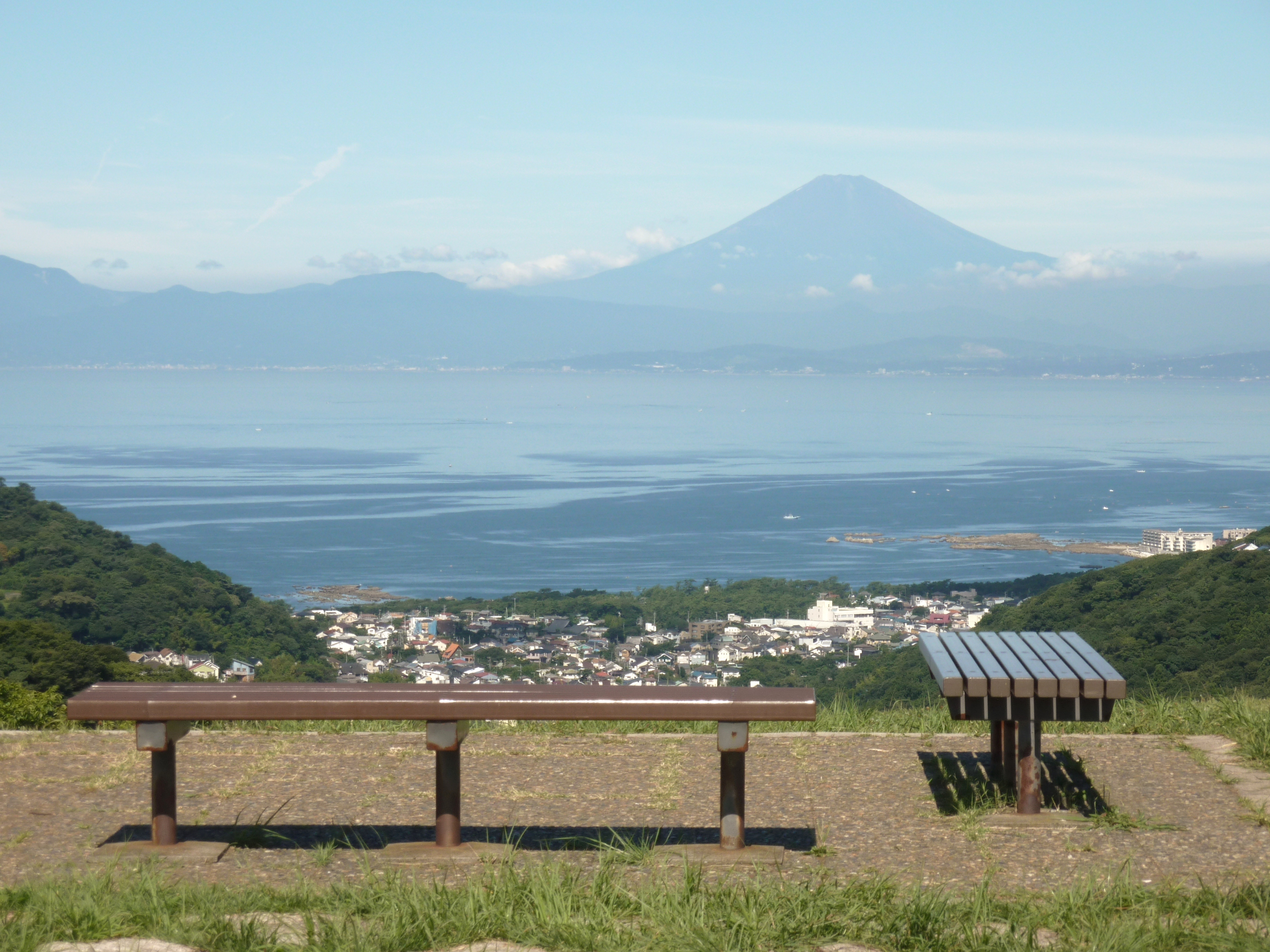 神奈川県葉山町・横須賀市。湘南国際村より富士山を望む。